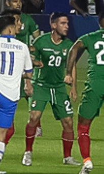 (São Paulo - SP, 14/06/2019) Jogo de Abertura da Copa América Brasil 2019. Foto: Marcos Corrêa/PR